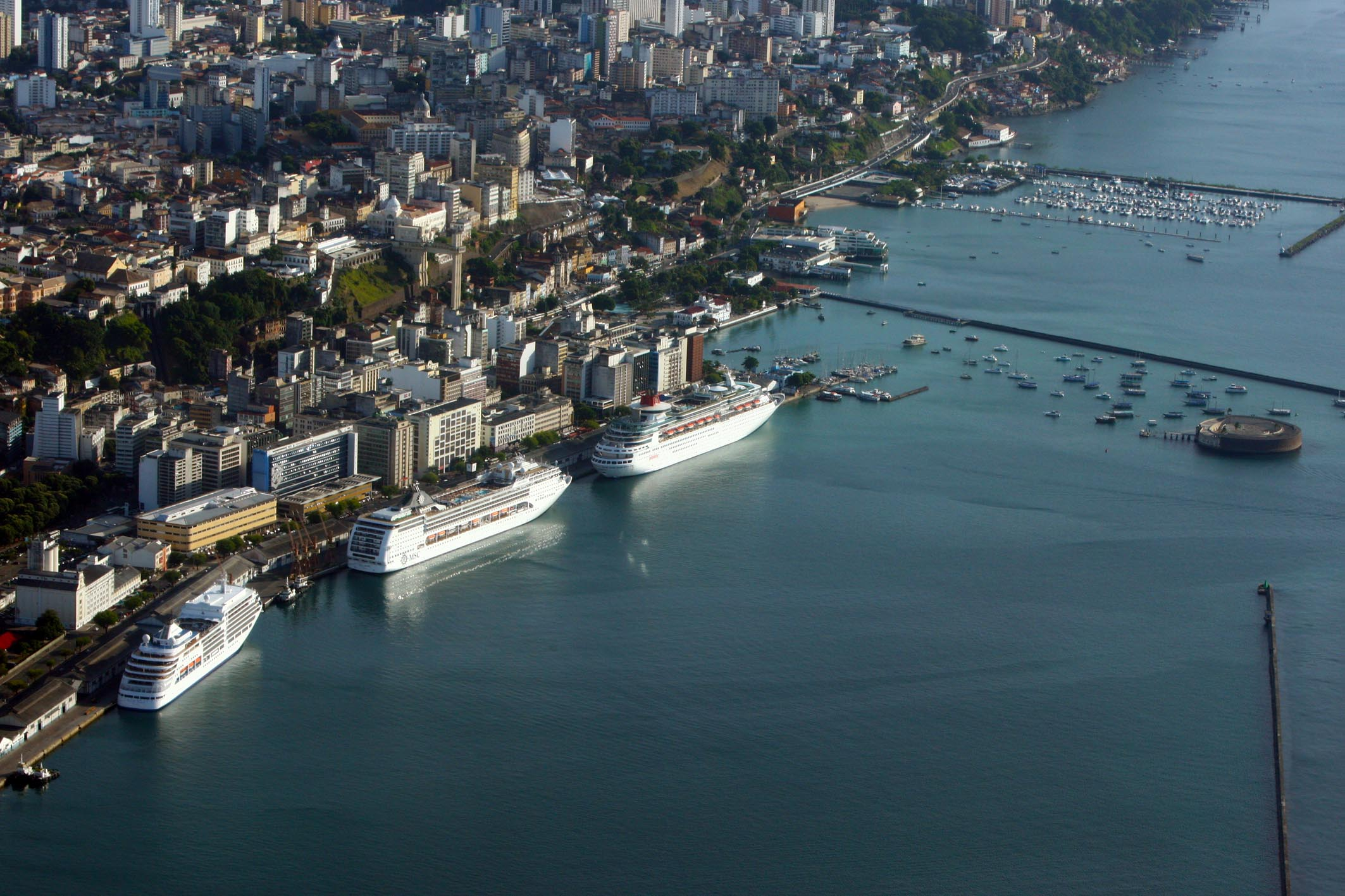 Porto de Salvador Foto Manu Dias/AGECOM